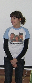 Ignacio Vilar, Rubén Riós, Tamara Canosa e Roberto Porto presentando a película Pradolongo no I.E.S. Manuel García Barros da Estrada. Realizada co permiso dos fotografados.